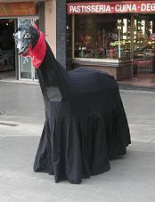 Mula de Sant Feliu de Llobregat